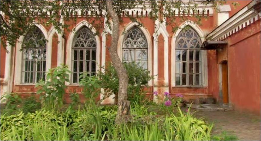 Здание библиотеки в Чернигове.